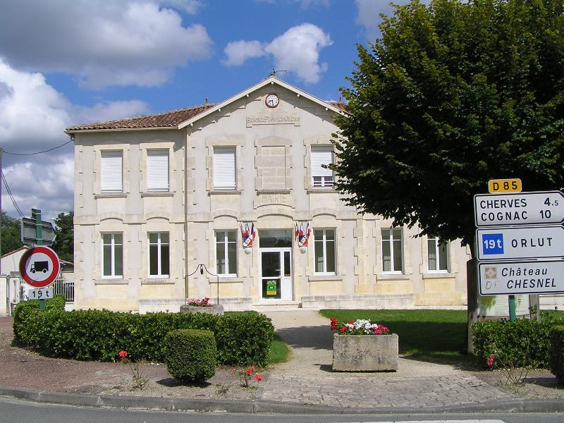 mairie de Mesnac